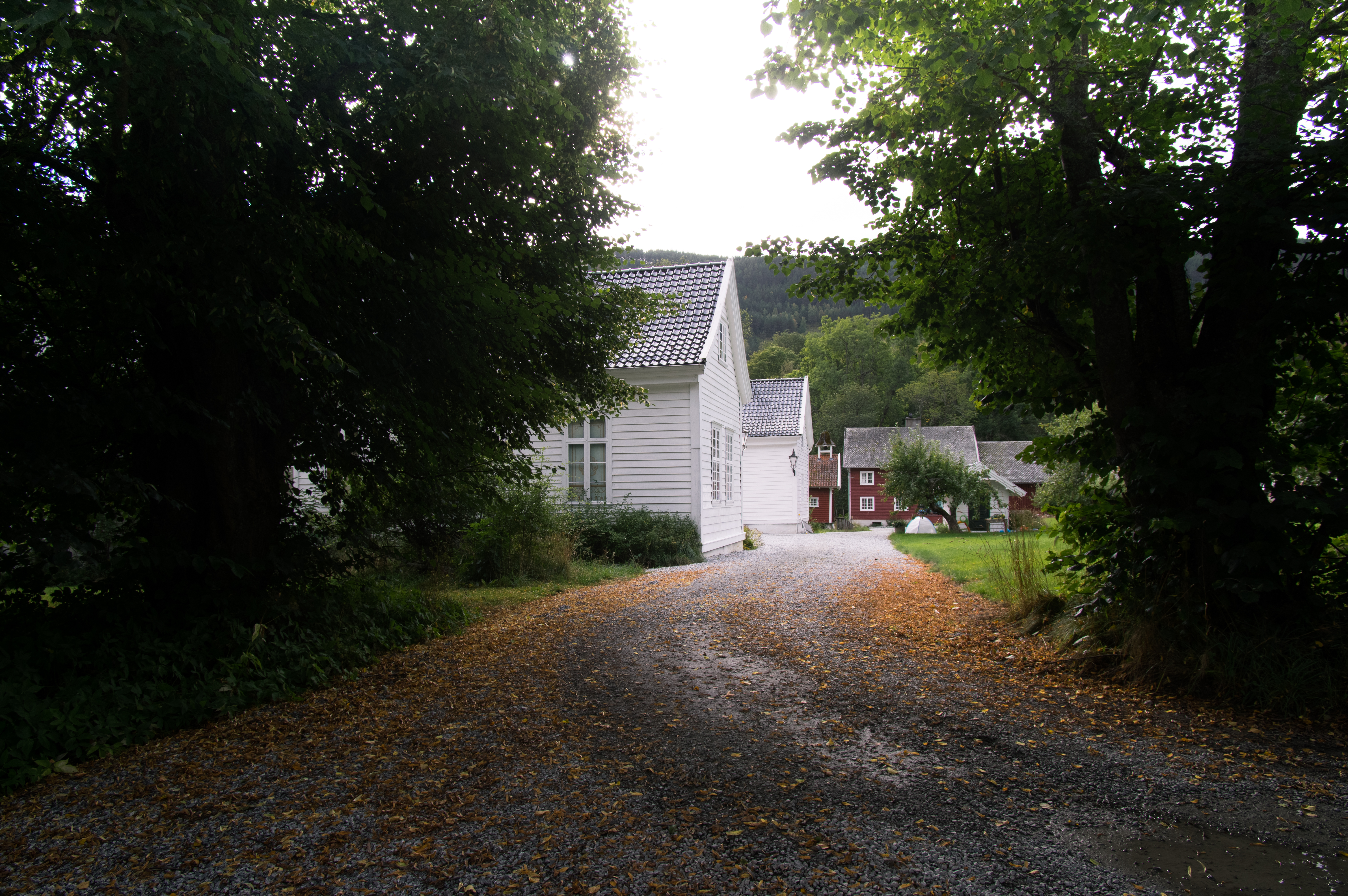 Kaupanger main farm, entrance.